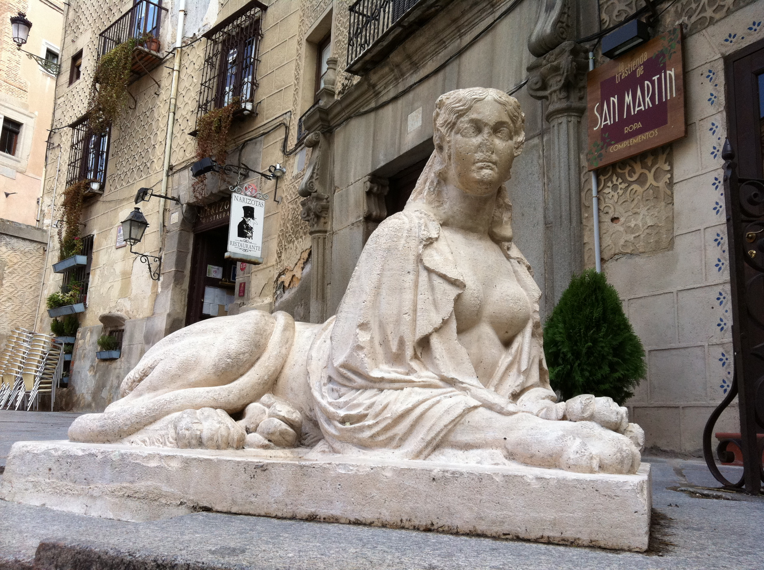 Escultura de sirena en la plaza de Medina del Campo (popularmente de las Sirenas), de la ciudad de Segovia. Obra de Francisco Bellver en 1852.